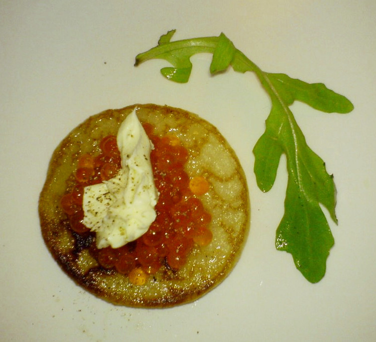 Små blinis med rogn, rucola og rå løg - oladji?